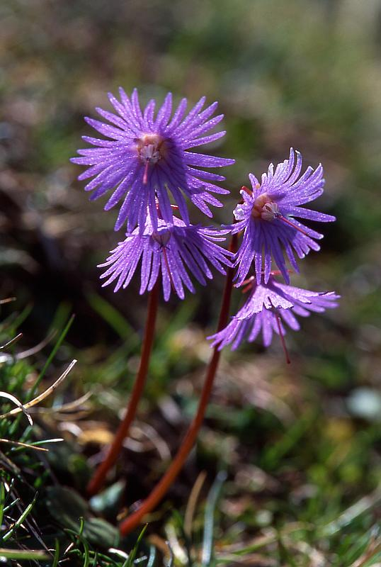 Soldanella alpina, ,Bious Artigues (64)